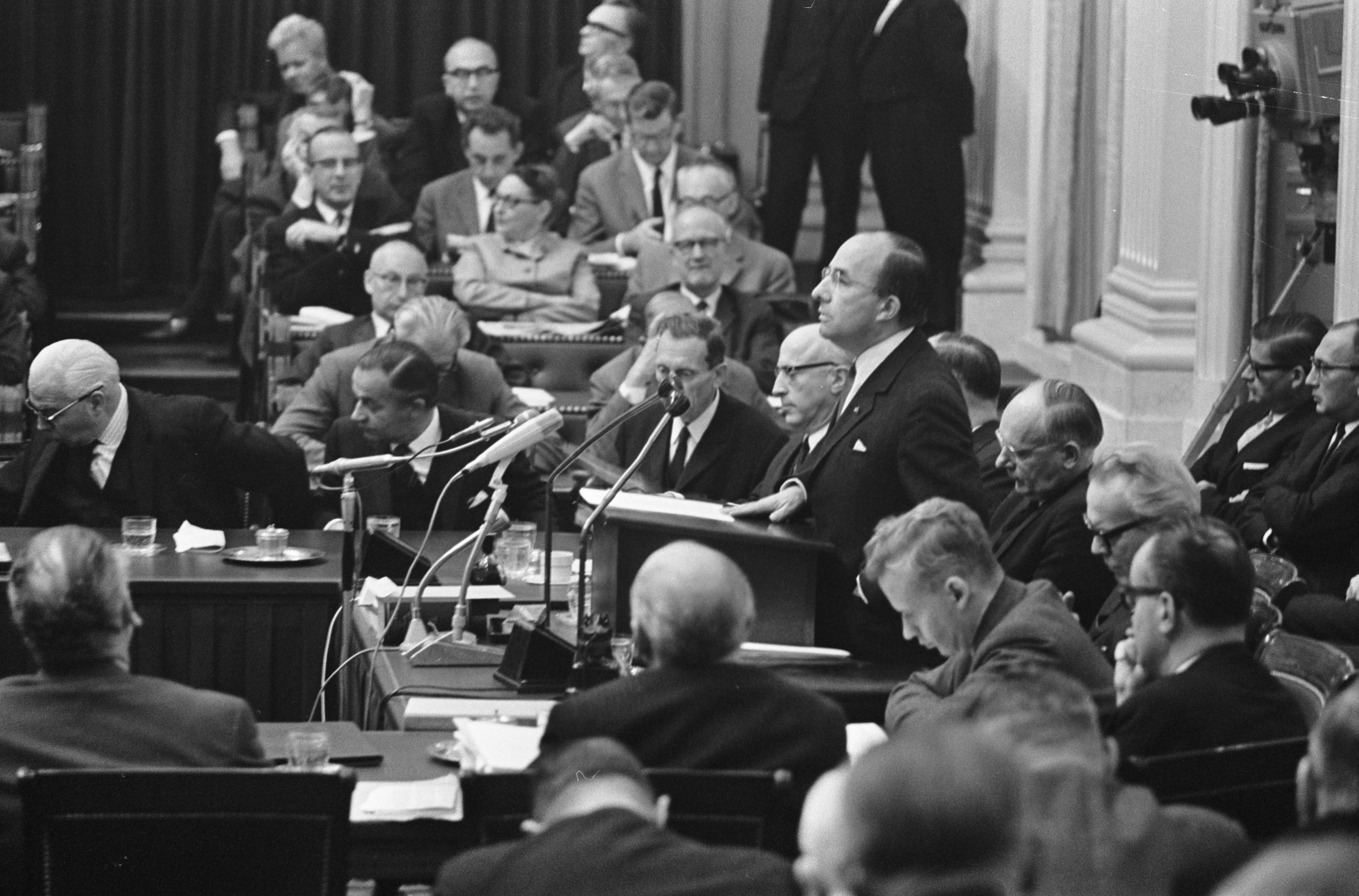 Collectie / Archief : Fotocollectie Anefo Reportage / Serie : Tweede Kamer tijdens de algemene beschouwingen 1966 Beschrijving : Minister-president Jo Cals (KVP) aan het woord Datum : 13 oktober 1966 Locatie : Den Haag, Zuid-Holland Trefwoorden : ministers-presidenten, parlementaire debatten, politiek Persoonsnaam : Cals, J.M.L.Th. Fotograaf : Ron Kroon / Anefo Auteursrechthebbende : Nationaal Archief Materiaalsoort : Negatief (zwart/wit) Nummer archiefinventaris : bekijk toegang 2.24.01.05 Bestanddeelnummer : 919-6773